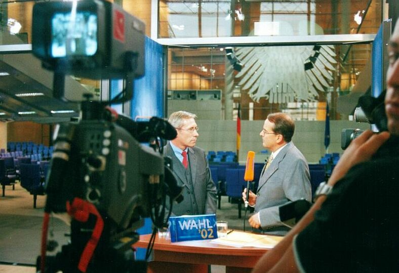 Roland Claus (links) am 22. September 2002, dem Tag der Bundestagswahl, abends vor dem Plenarsaal des Bundestages im Interview mit dem Fernsehsender phoenix (Alfred Schier).